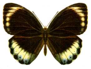 Elymnias agondas australiana